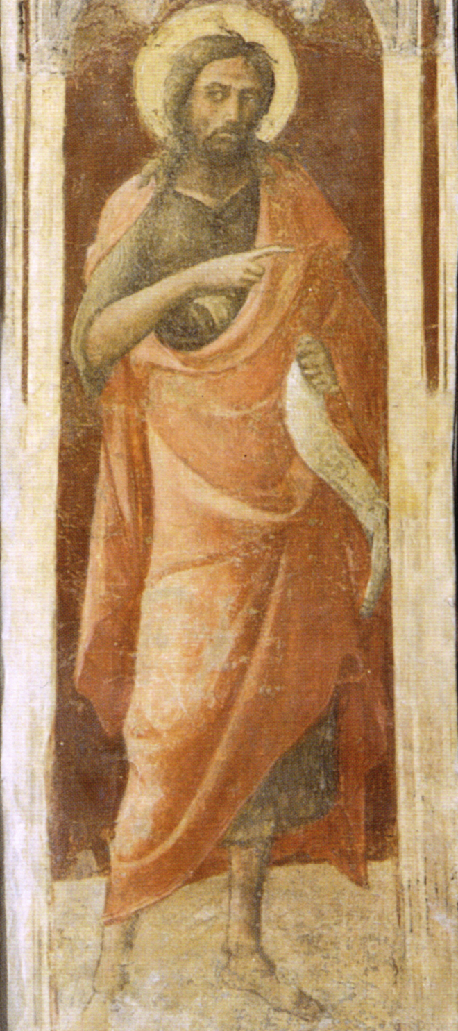 Lorenzo monaco, giovanni battista